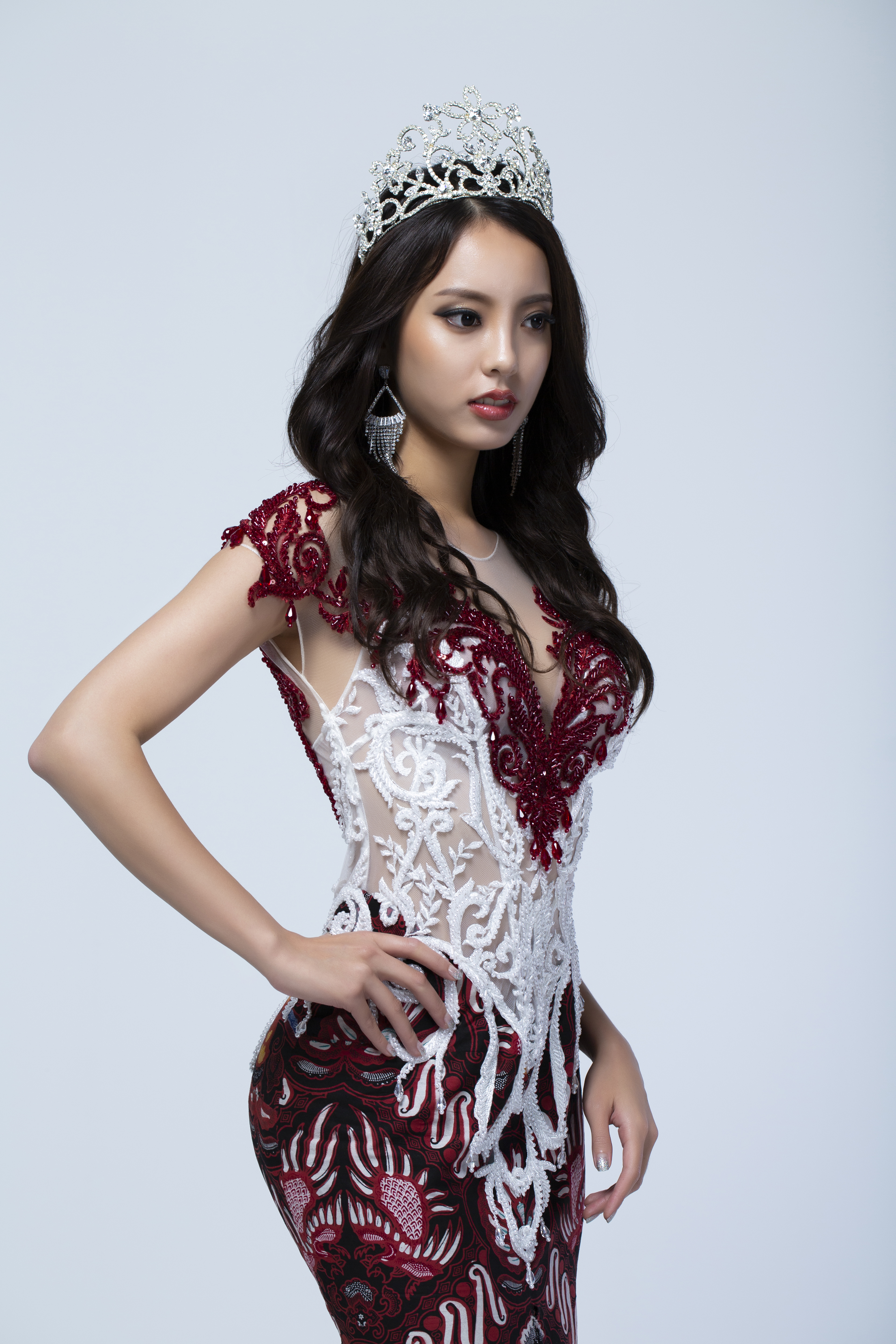 미스그랜드코리아 2019 우승자 박세림 The winner of Miss Grand Korea 2019, Park Serim